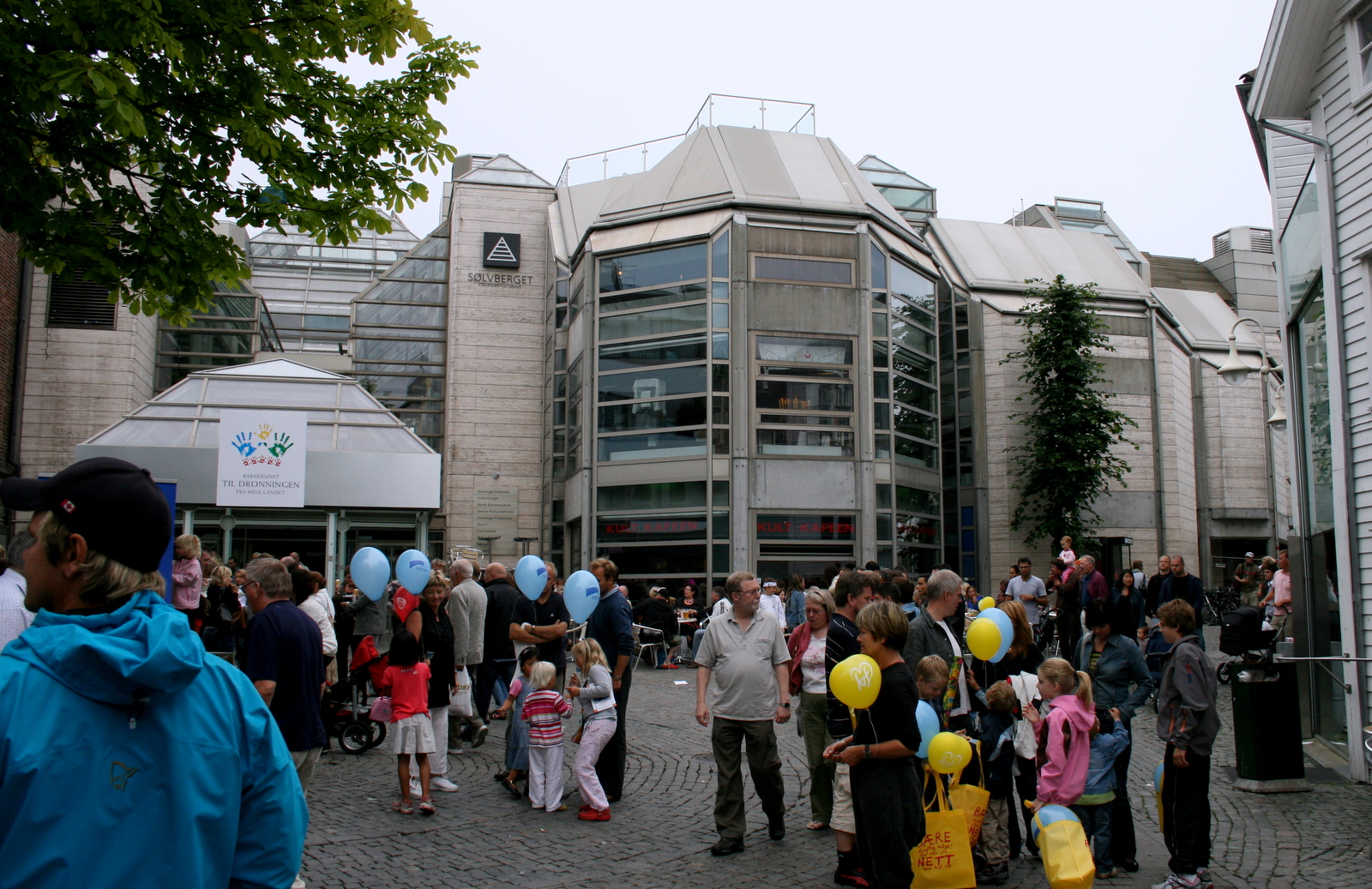 Stavanger kulturhus